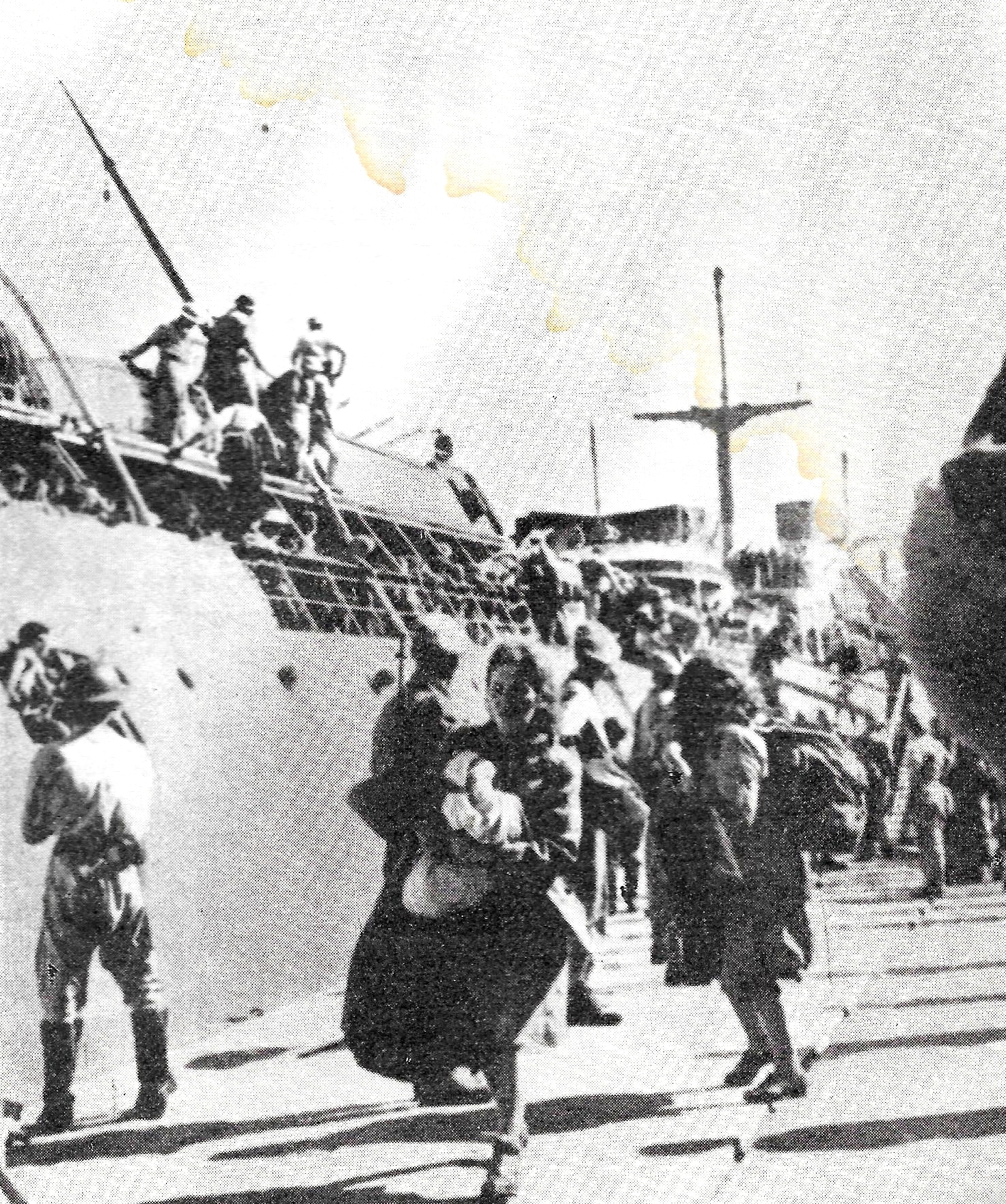 מעפילי לטרון מועברים לאוניית הגירוש בנובמבר 1946